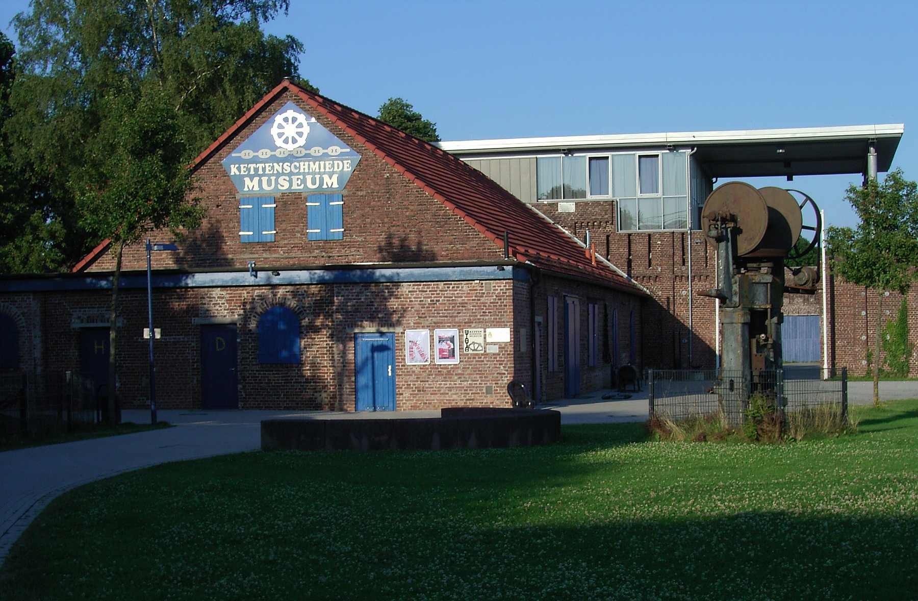 Das Kettenschmiedemuseum in Fröndenberg, Nordrhein-Westfalen, am Südrand des Ruhrgebiets. Das Museum ist Teil der Route der Industriekultur, Themenrouten 10, 11 und 12.